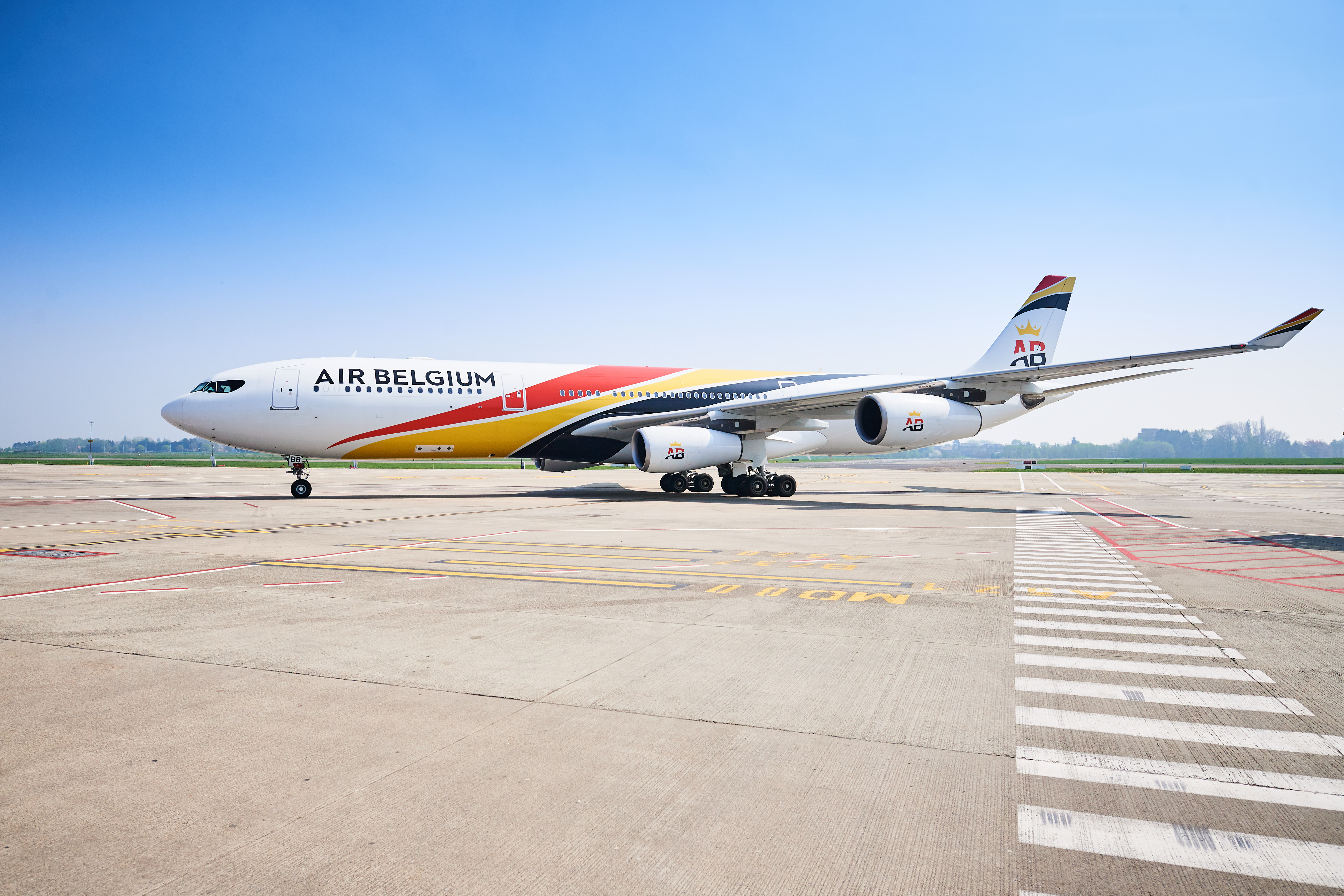 Een Airbus A340 van Air Belgium, net voor de eerste voorbereidingsvlucht vanaf Brussels South Charleroi Airport.